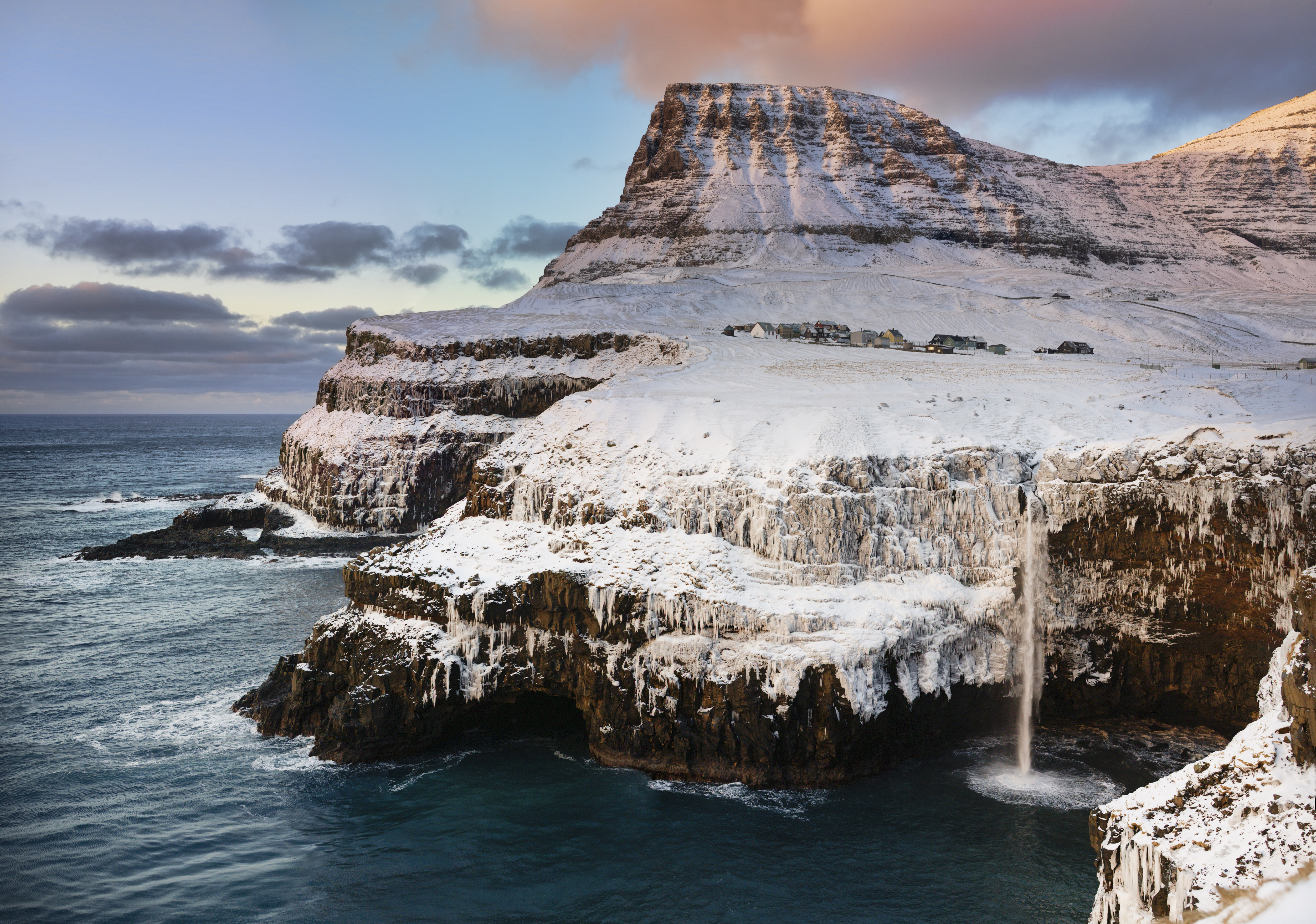 Gásadalur